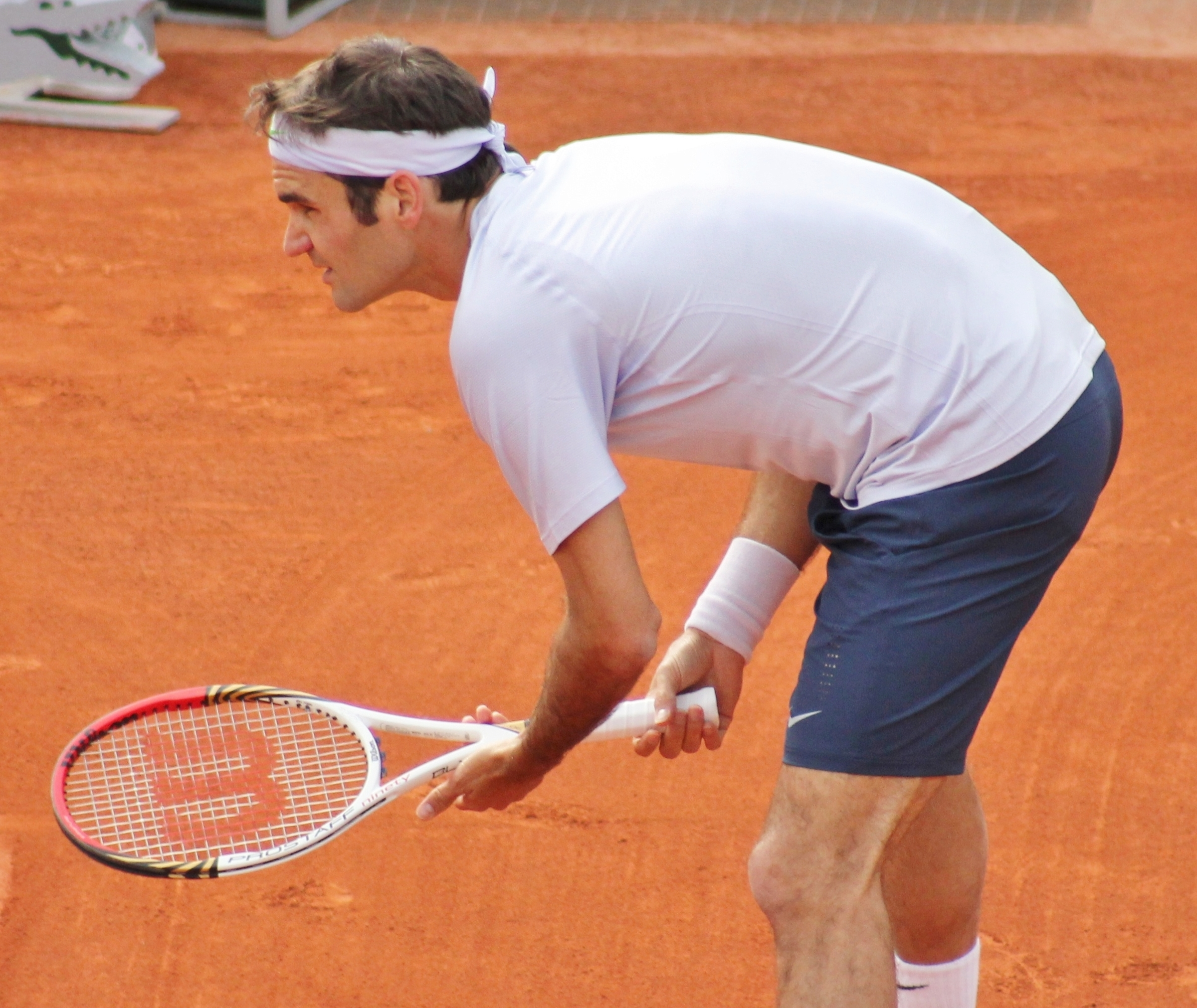 Federer RG13 (66)